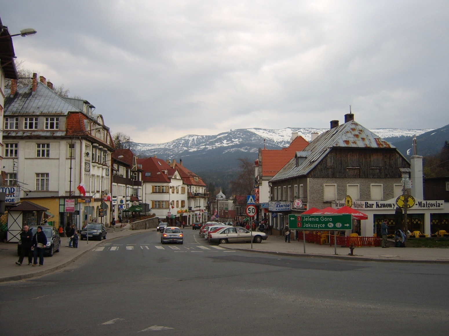 Szklarska Poręba - Centrum Autor: Cruizer